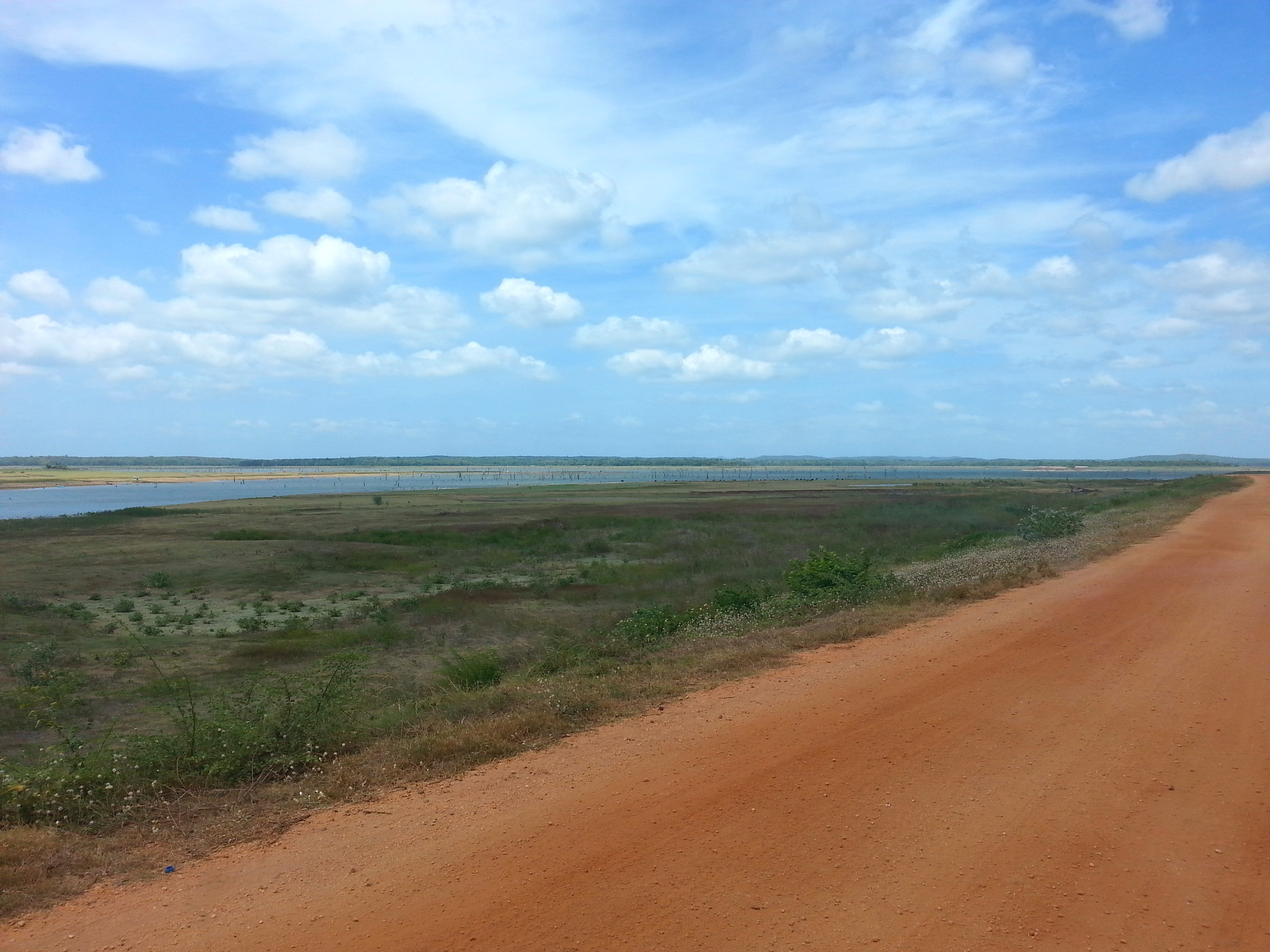 பதவியா குளம் இலங்கையின் வடமத்திய மாகாணத்தின் பதவியா என்னும் நகரிலுள்ள பிரசித்தி பெற்ற பழைய நீர்ப்பாசனக் குளங்களுள் ஒன்றாகும்.